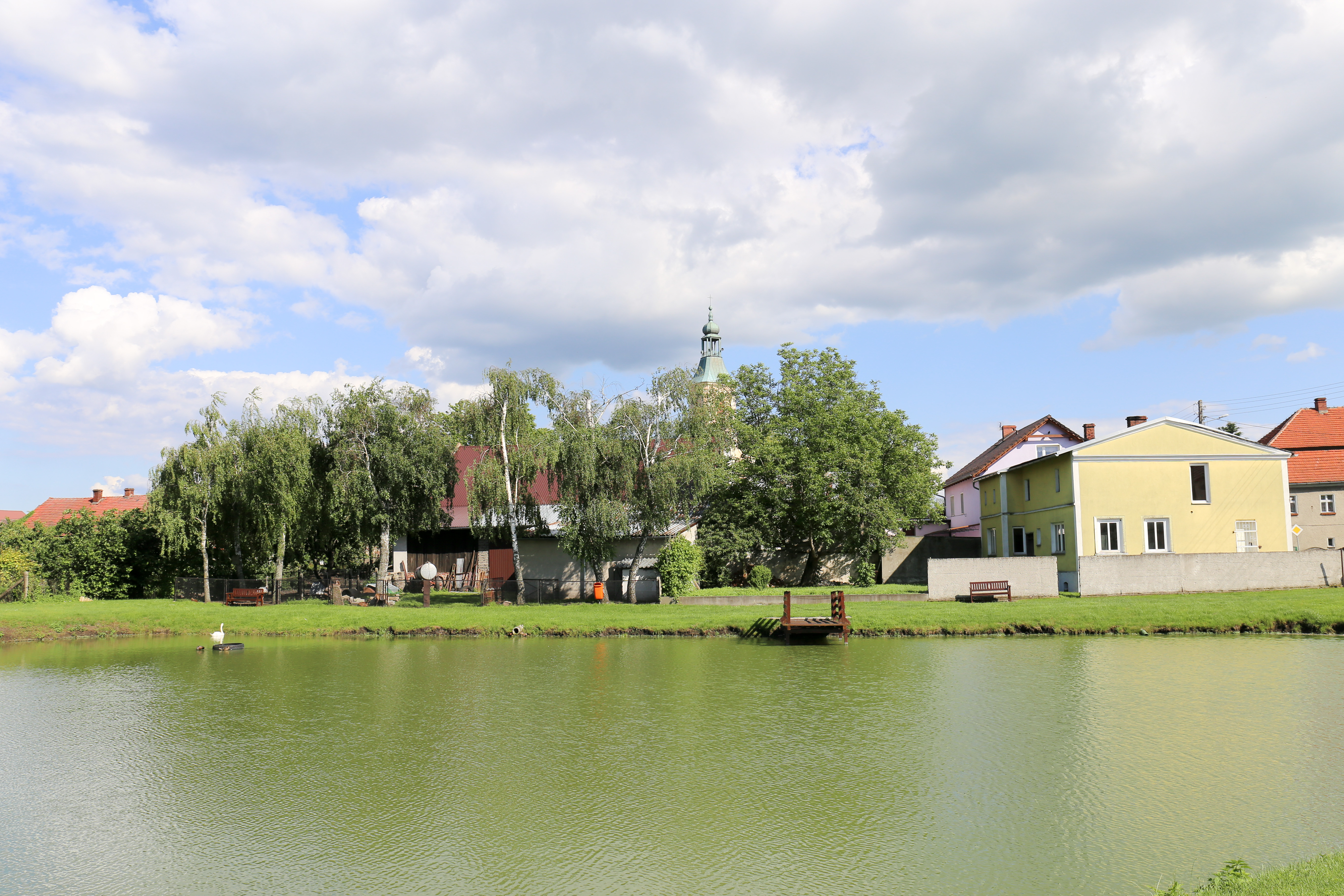 Maciowakrze (Matzkirch) - wieś w Polsce położona w województwie opolskim, w powiecie kędzierzyńsko-kozielskim, w gminie Pawłowiczki.